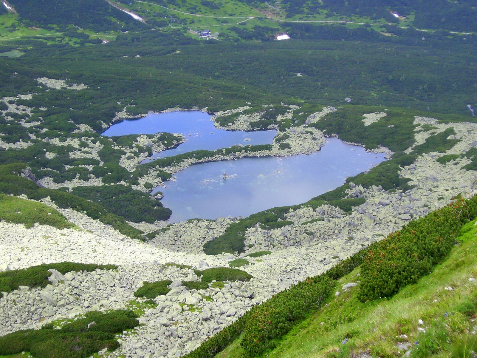 Dwoisty Staw Gąsienicowy z Małego Kościelca